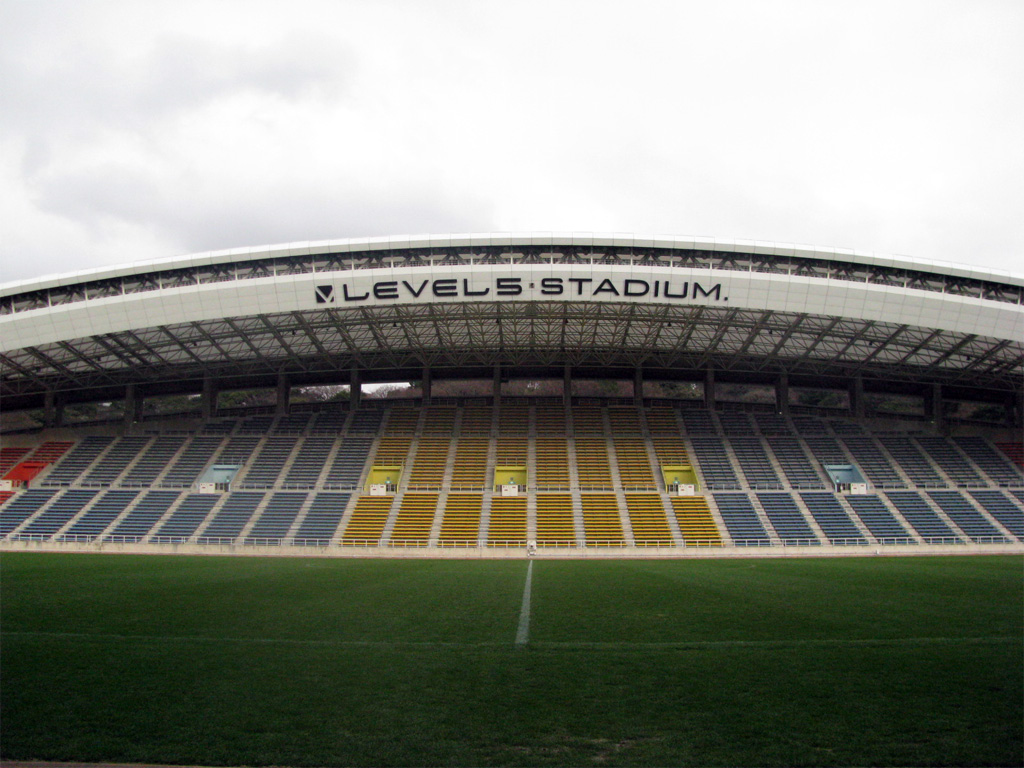 自身がレベスタにて撮影したもの